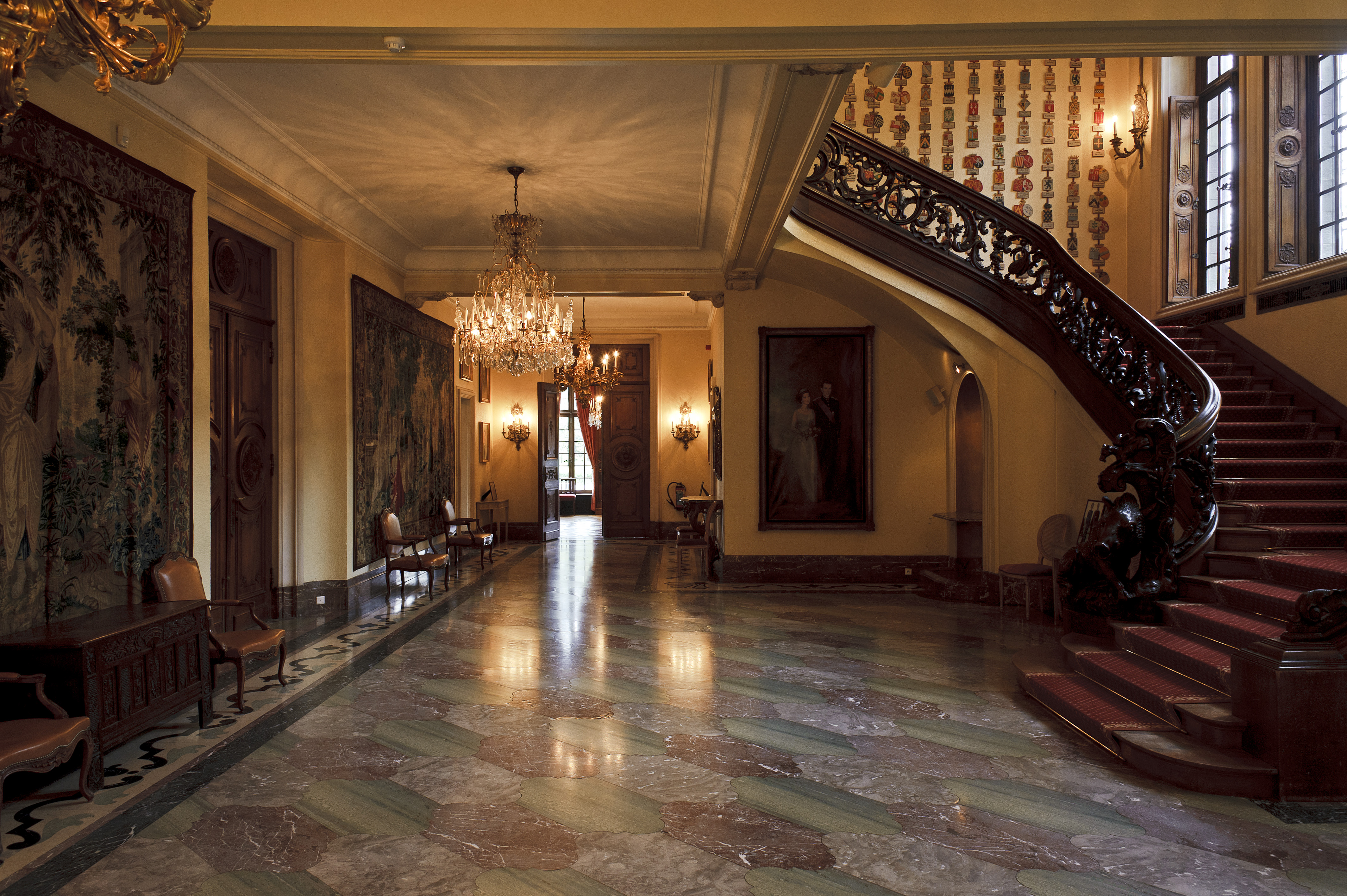 Association de la noblesse du royaume de Belgique. Avenue Franklin Roosevelt 25, Bruxelles